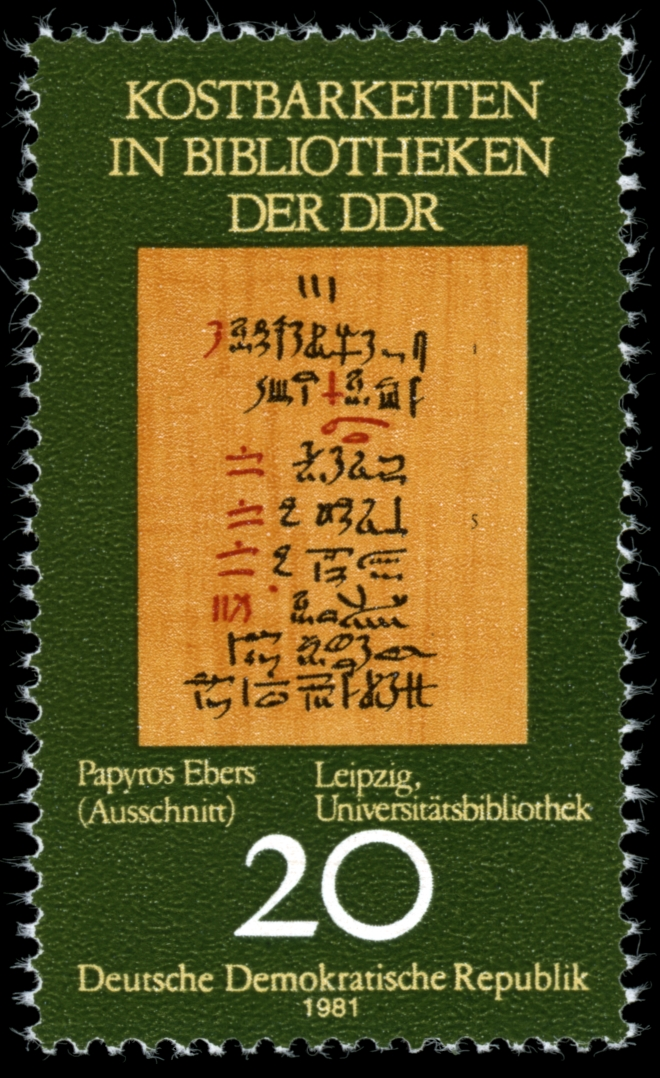 Information: Kostbarkeiten in Bibliotheken der DDR: Papyrus Ebers (Detail), Universitätsbibliothek Leipzig Ausgabepreis: 20 Pfennig First Day of Issue / Erstausgabetag: 18. August 1981 Auflage: 8.000.000 Entwurf: Müller Druckverfahren: Rastertiefdruck Michel-Katalog-Nr: Ländercode-MiNr: 2636